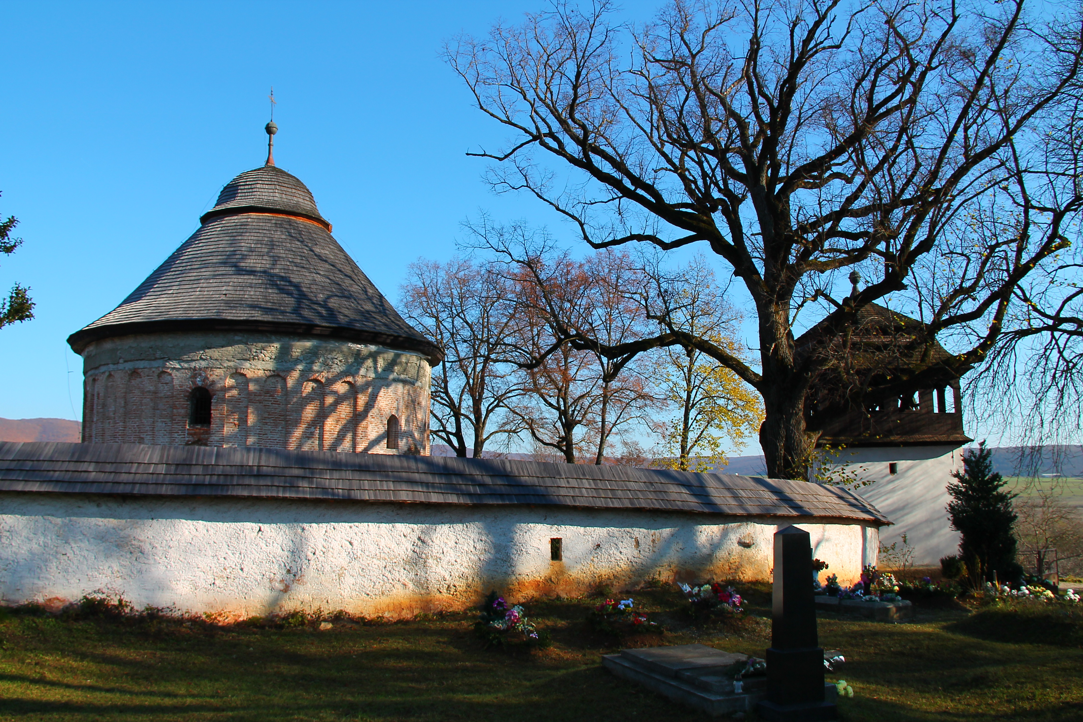 Süvetei körtemplom